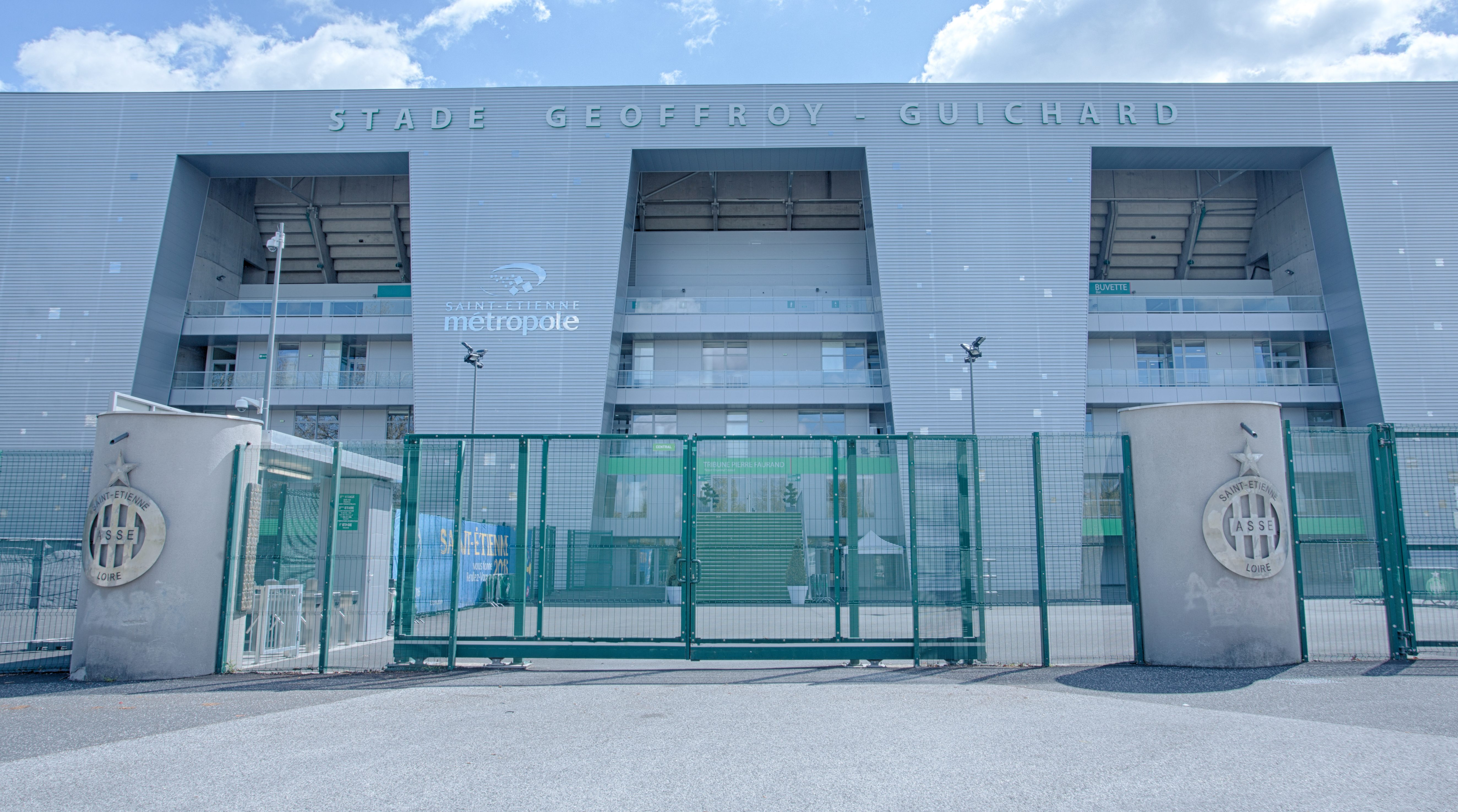 Entrée principale du stade rénové